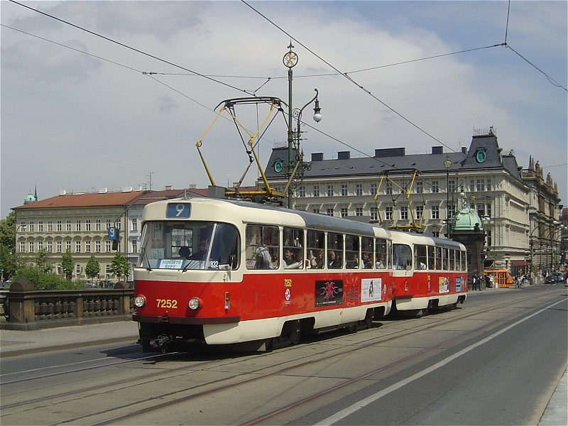 Straßenbahn des Tatra-Typs T3SUCS in Prag